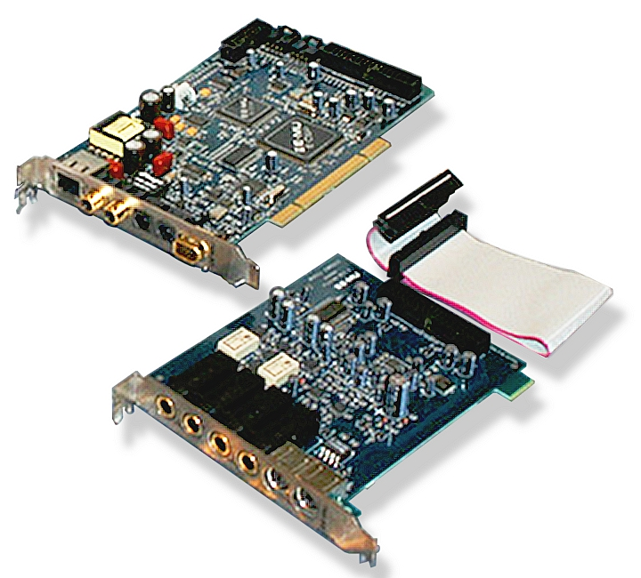 E-mu 1212m PCI Digital Augio System